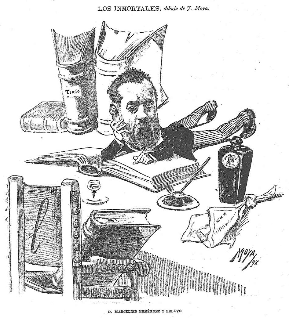 Los Inmortales. Dibujo de J. Moya.